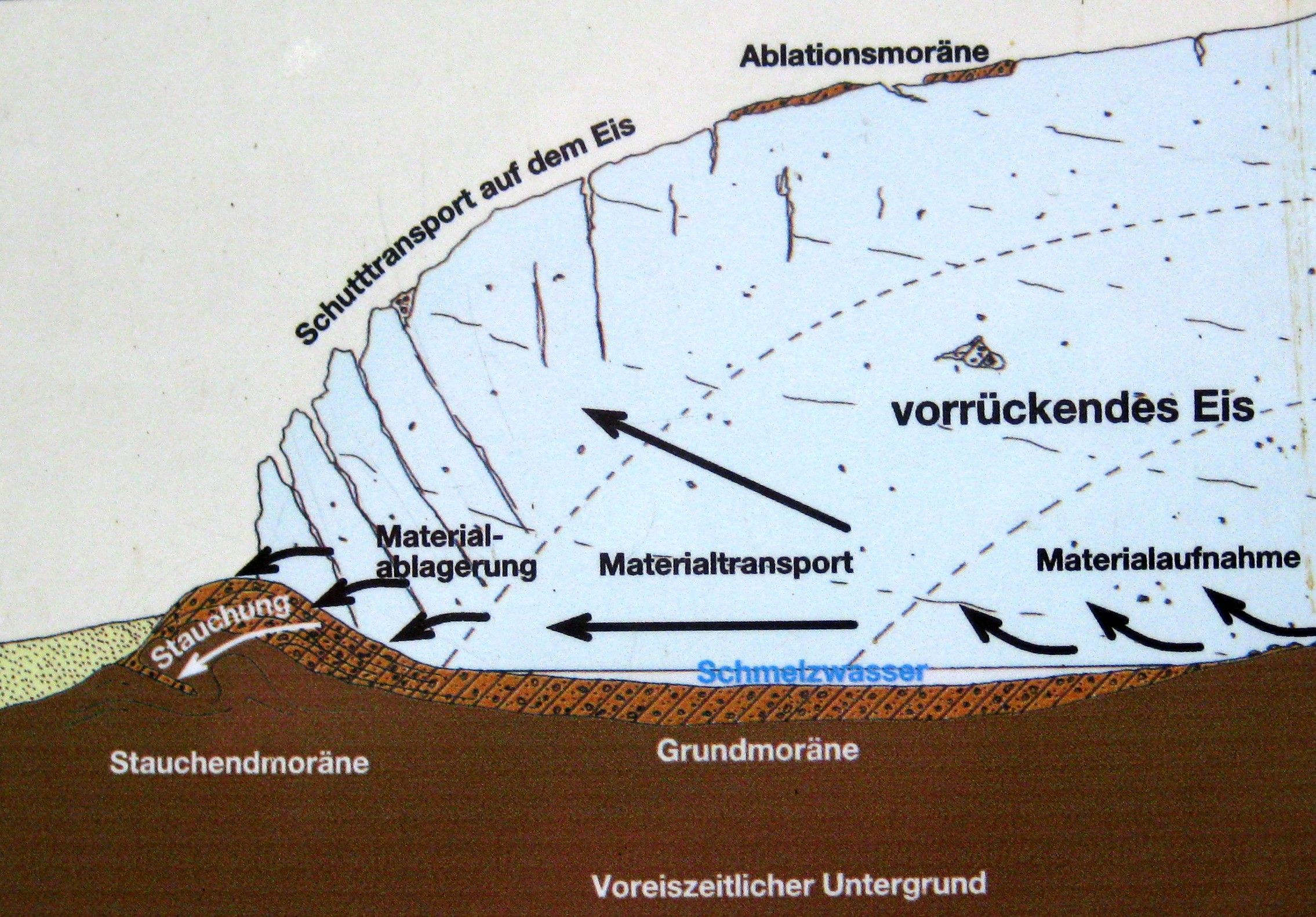 Erläuterungstafel an Station 7 des Eiszeitlehrpfads Tiefwarensee (Moränenbildung im Tiefwarensee-Bereich)